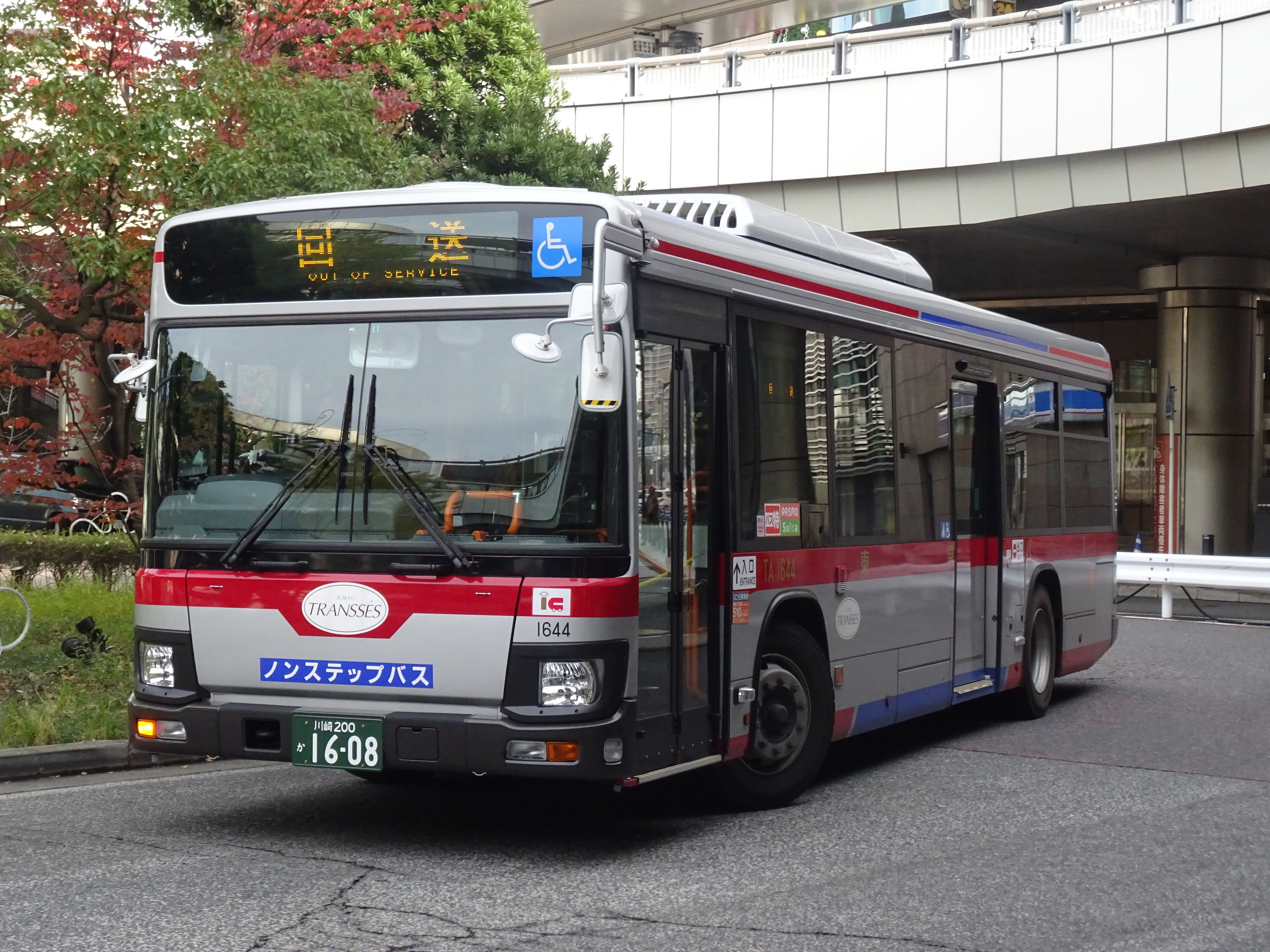 説明ありません